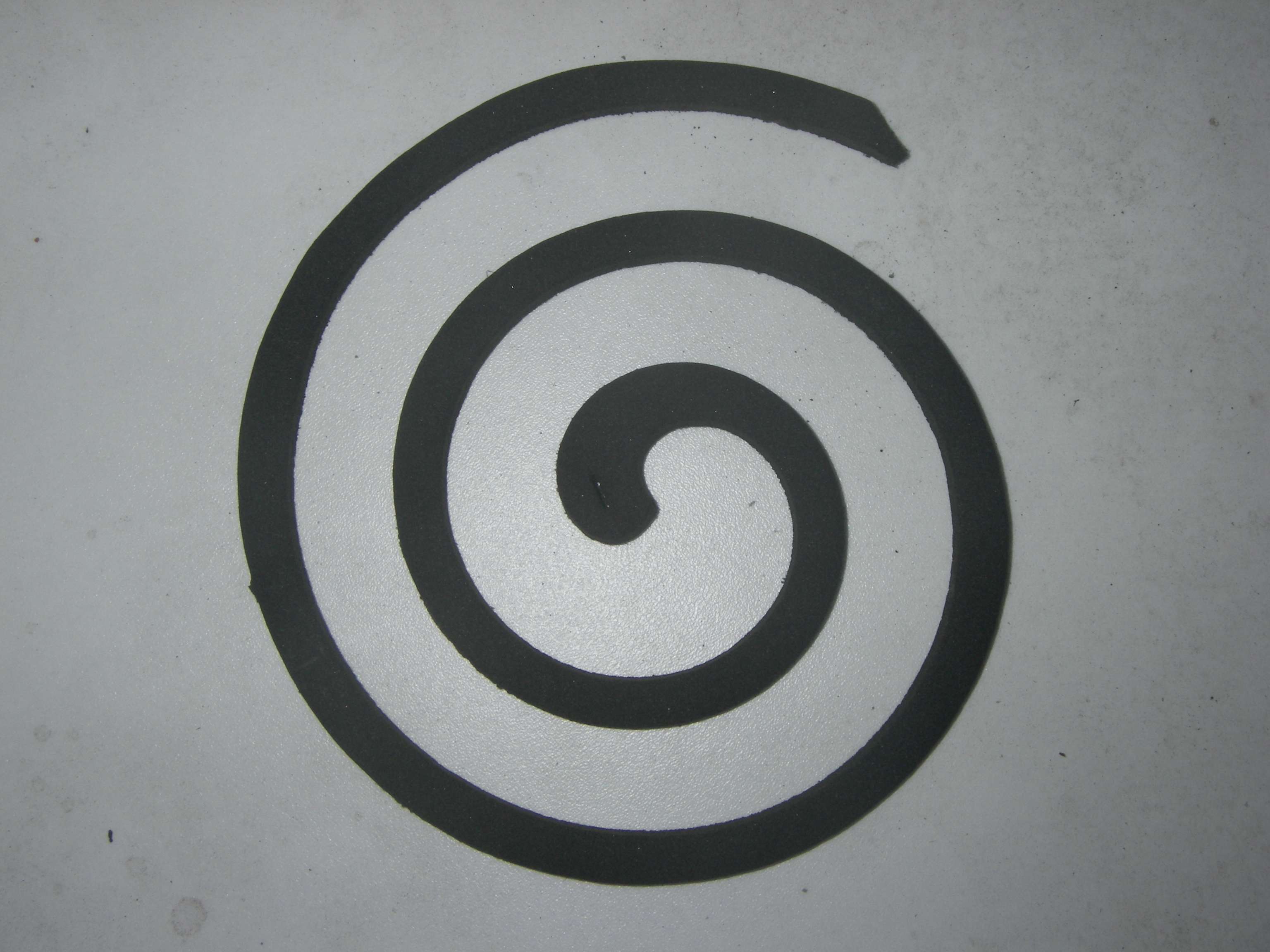 Спираль от комаров (отделённая от остальных двух)